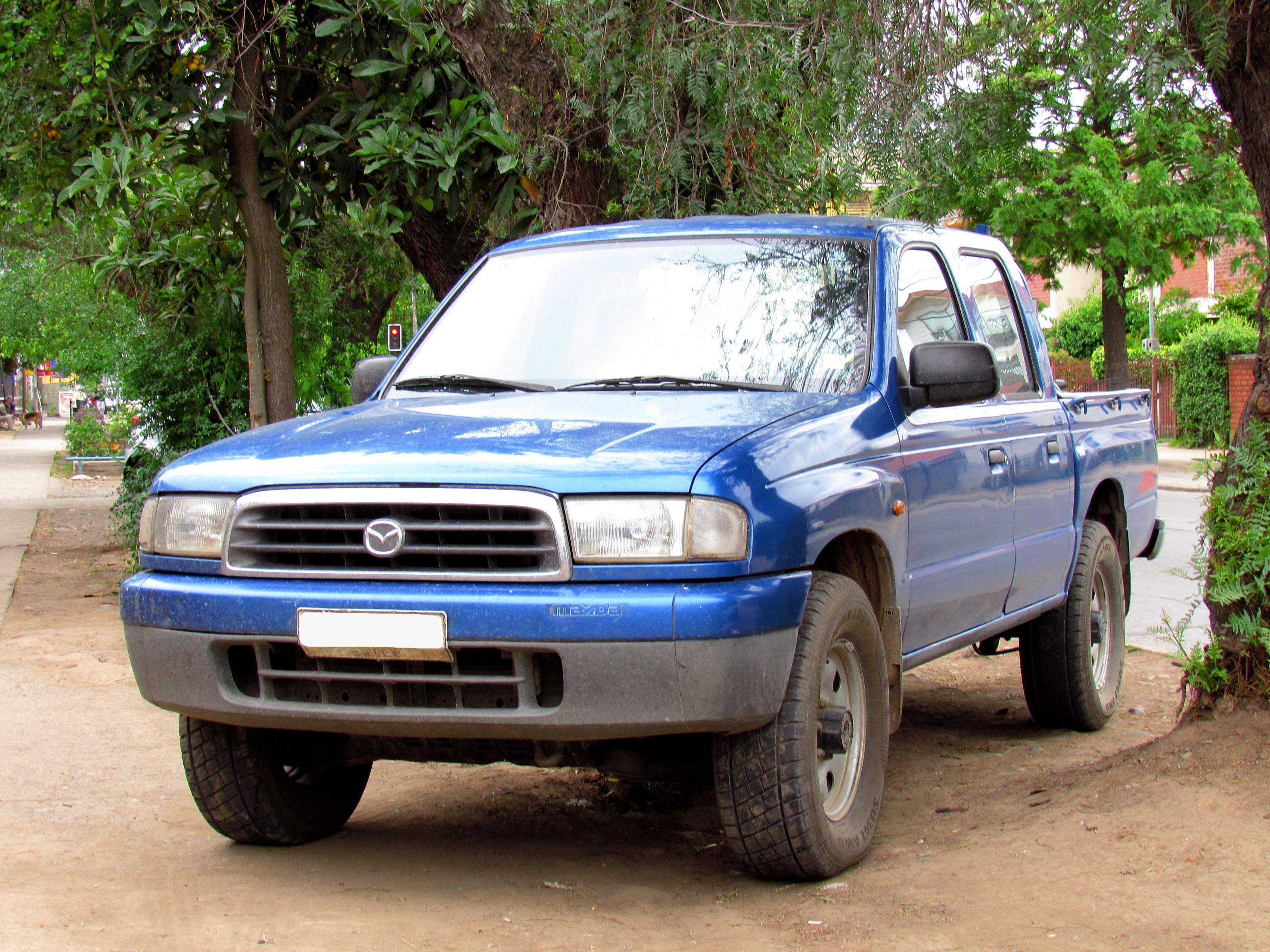 Mazda B 2500 Crew Cab 4x4 2000